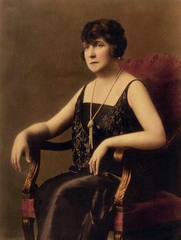 Rosa Ester Rodríguez Velasco (30 de agosto de 1872 - 6 de noviembre de 1936) fue primera dama de Chile.